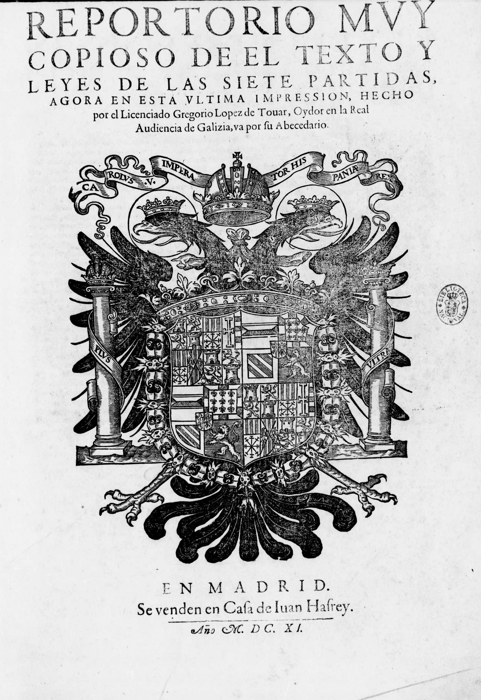 Frontespizio